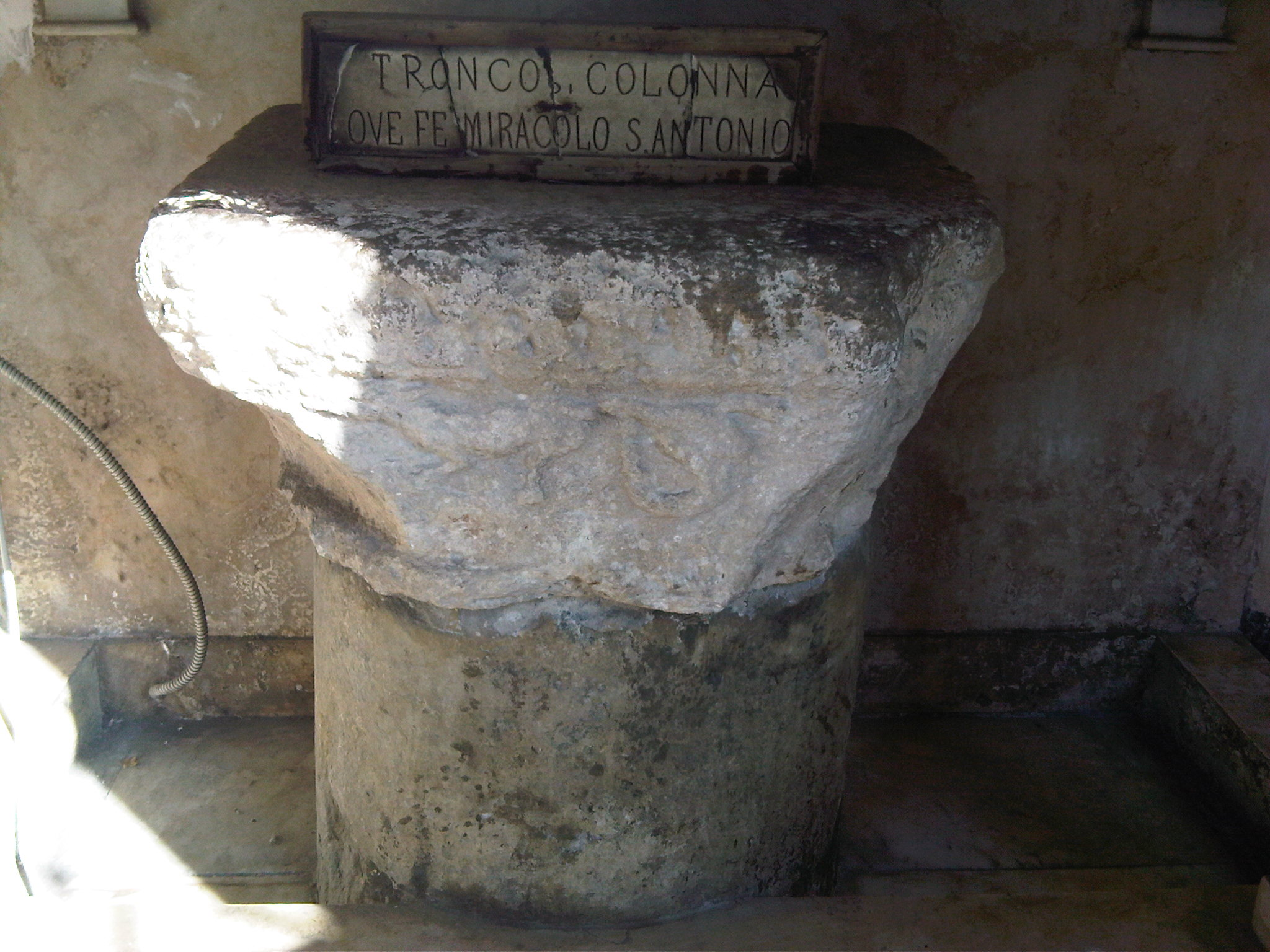 Dettaglio, all'interno del tempietto riminese del Bramante, della colonnina su cui la tradizione vuole che Sant'Antonio di Padova abbia compiuto il Miracolo eucaristico della mula nella città di Rimini